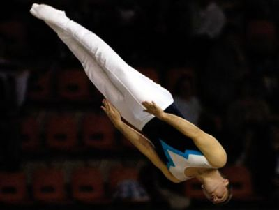 Trampoline club du Dauphiné : Meryl Varini aux championnats de France de trampoline en 2004 à Nîmes.